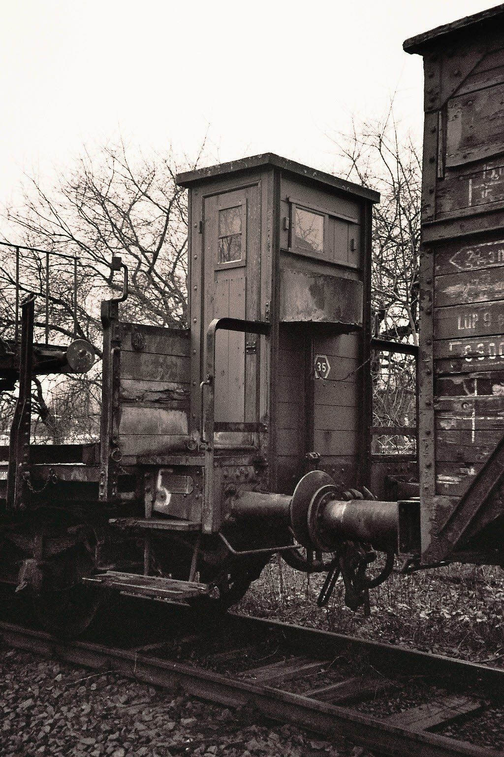 Bremserhaus auf einem Güterwagen der deutschen Bahn Eigenes Bild von Februar 2006